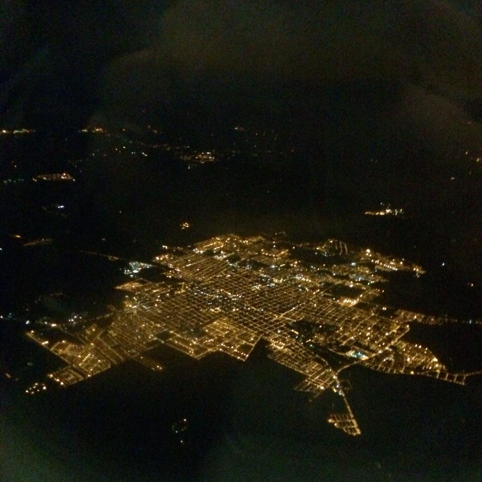 Palmira una ciudad con diversidad y mucha agricultura por donde la mires. Hermosa vista desde el aire Esta fotografía fue tomada en el municipio colombiano con código 76520.